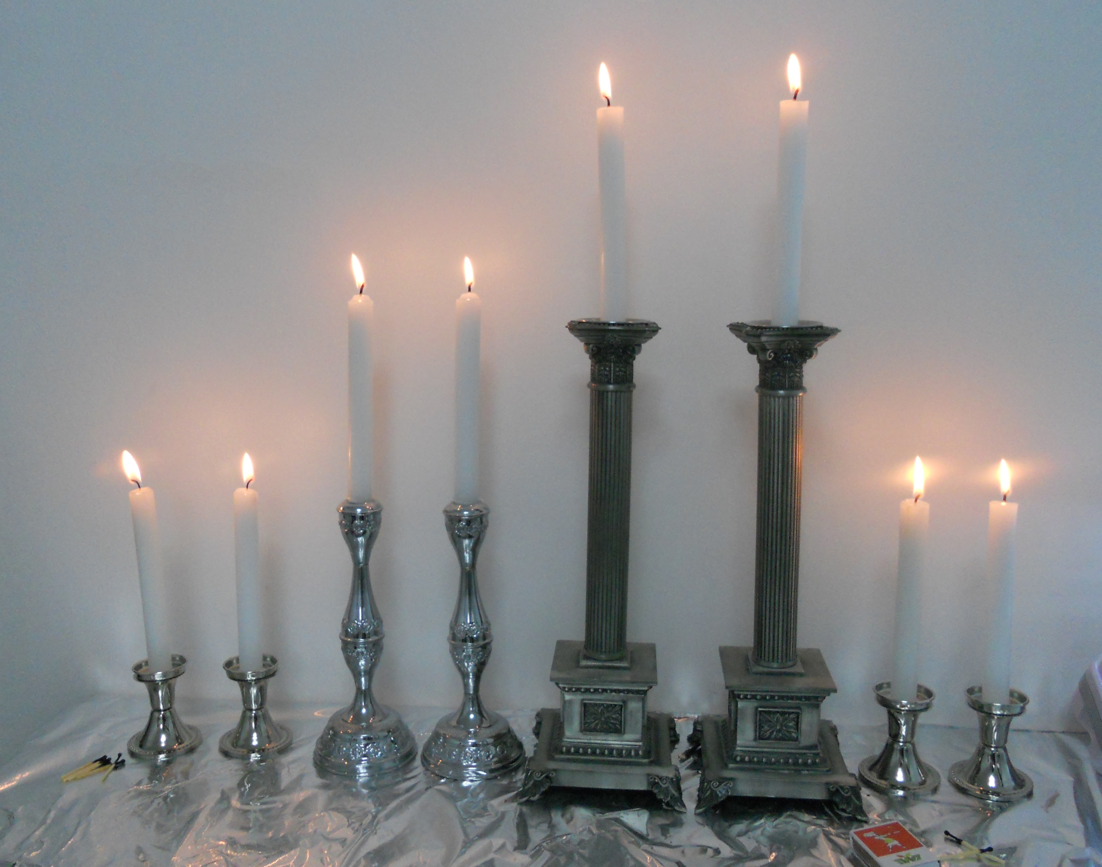 נרות שבת קודש